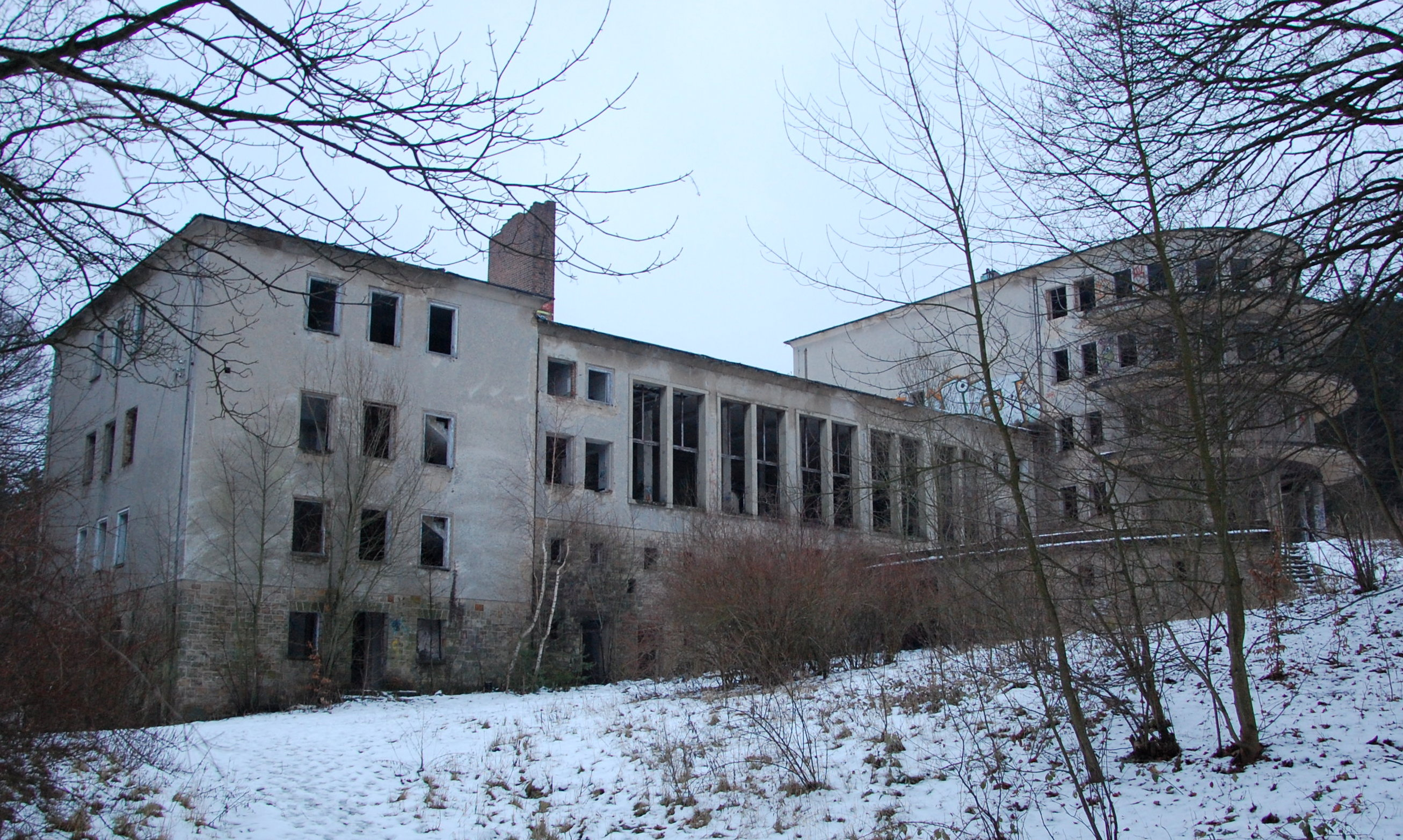 Ruine des FDGB-Ferienheim Fritz Heckert